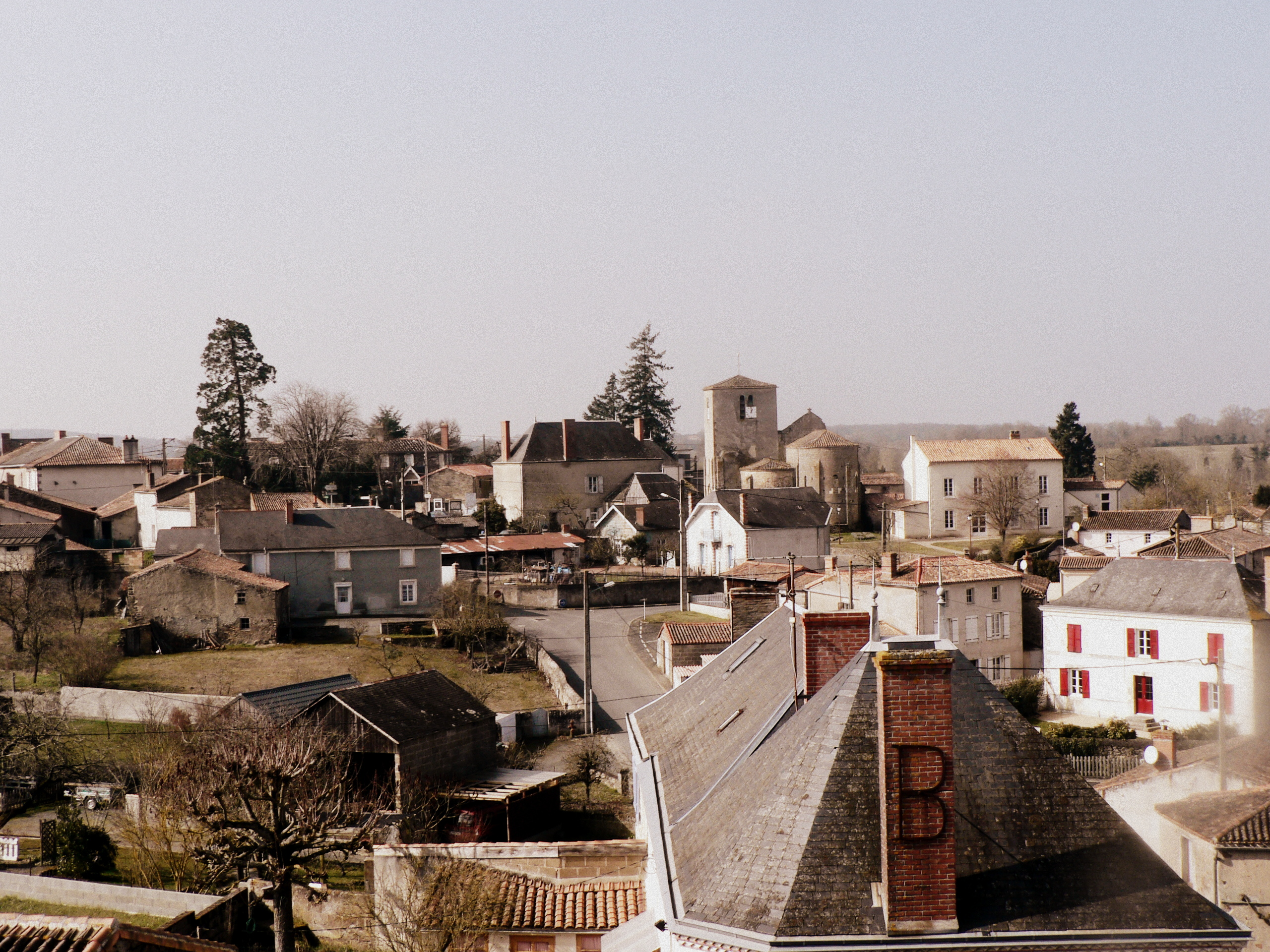 Vue globale de Glénay Deux Sèvres depuis le four à chaux (Reprise d'une ancienne carte postale)